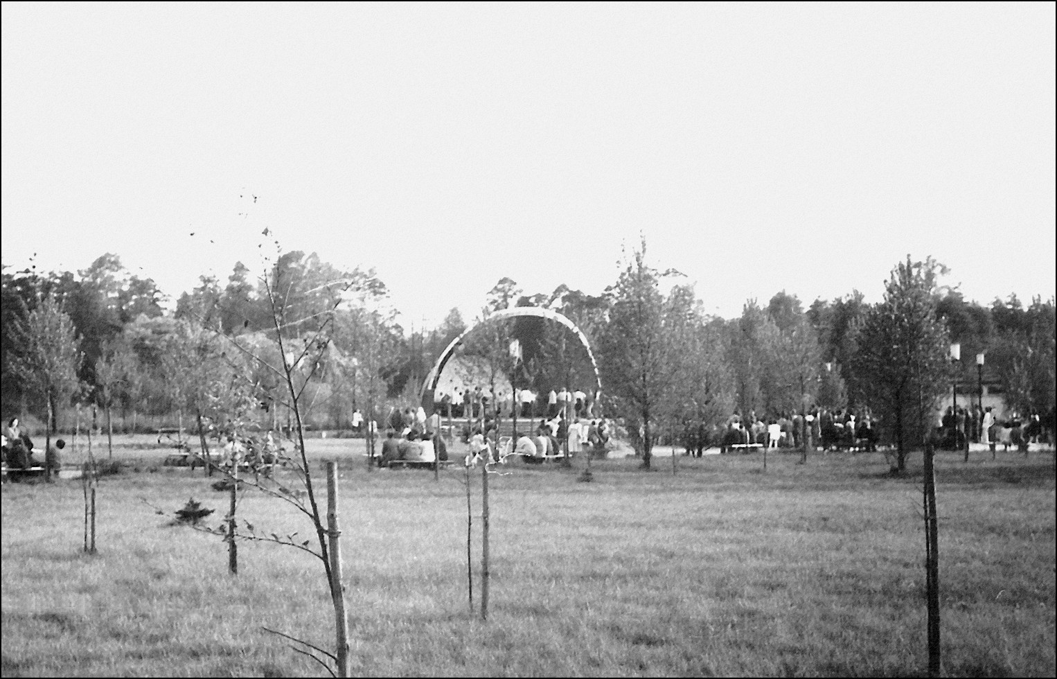 Ośrodek Bolina Janów - Nikiszowiec. Zdjęcie wykonane w latach siedemdziesiątych przez mojego ojca.